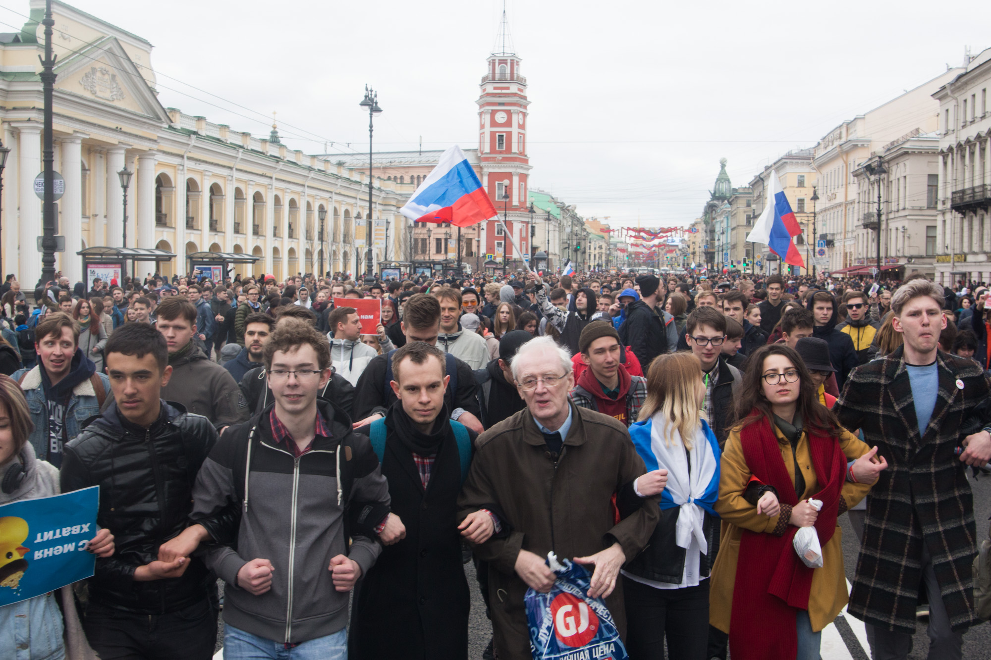 Перекрытие протестующими Невского проспекта на акции "Он нам не царь"